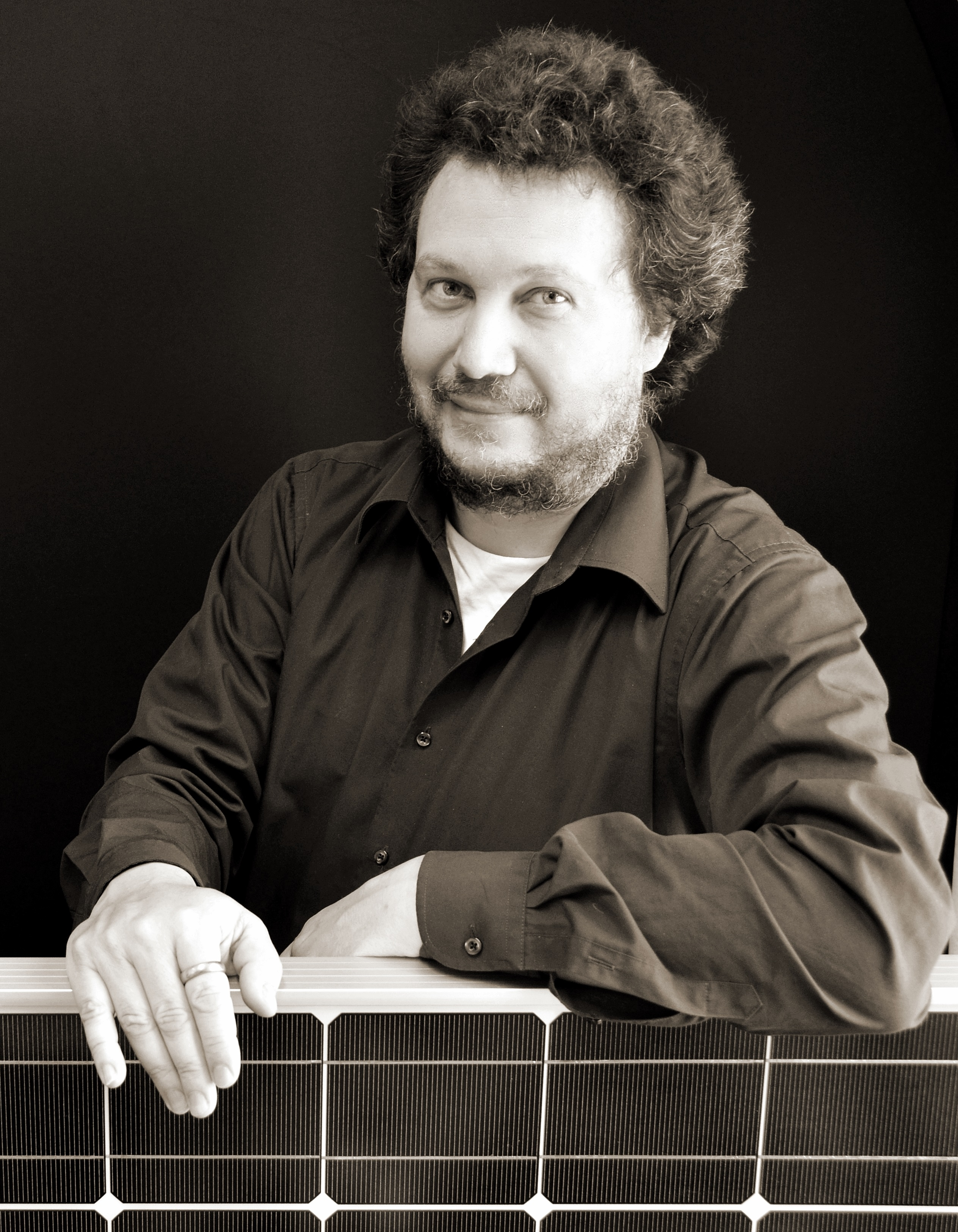 Prof._Dr.-Ing._Viktor_Wesselak